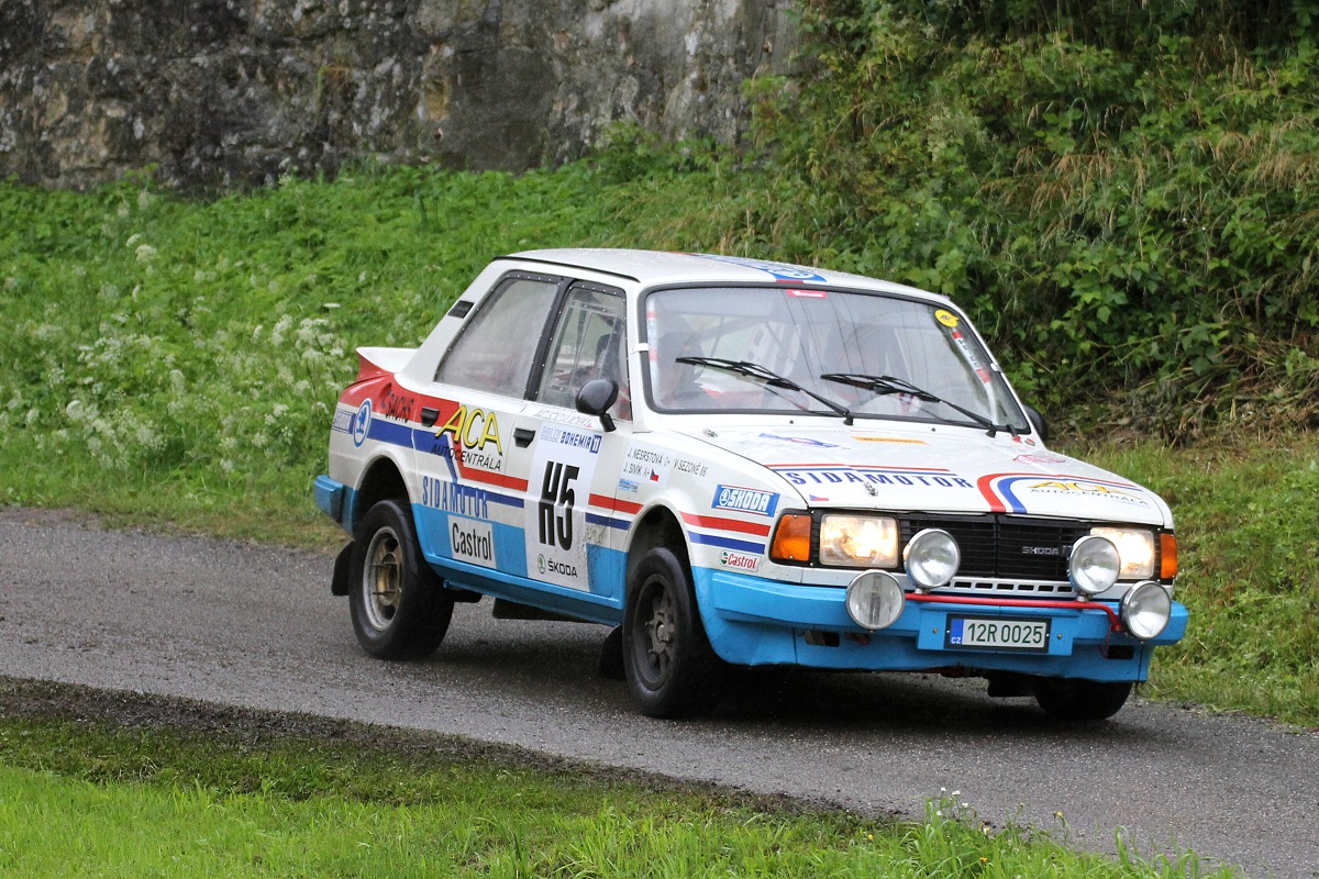 Rally Bohemia 2011